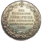 1 Taler Gold: Bremer Münze von 1863 (hinten)